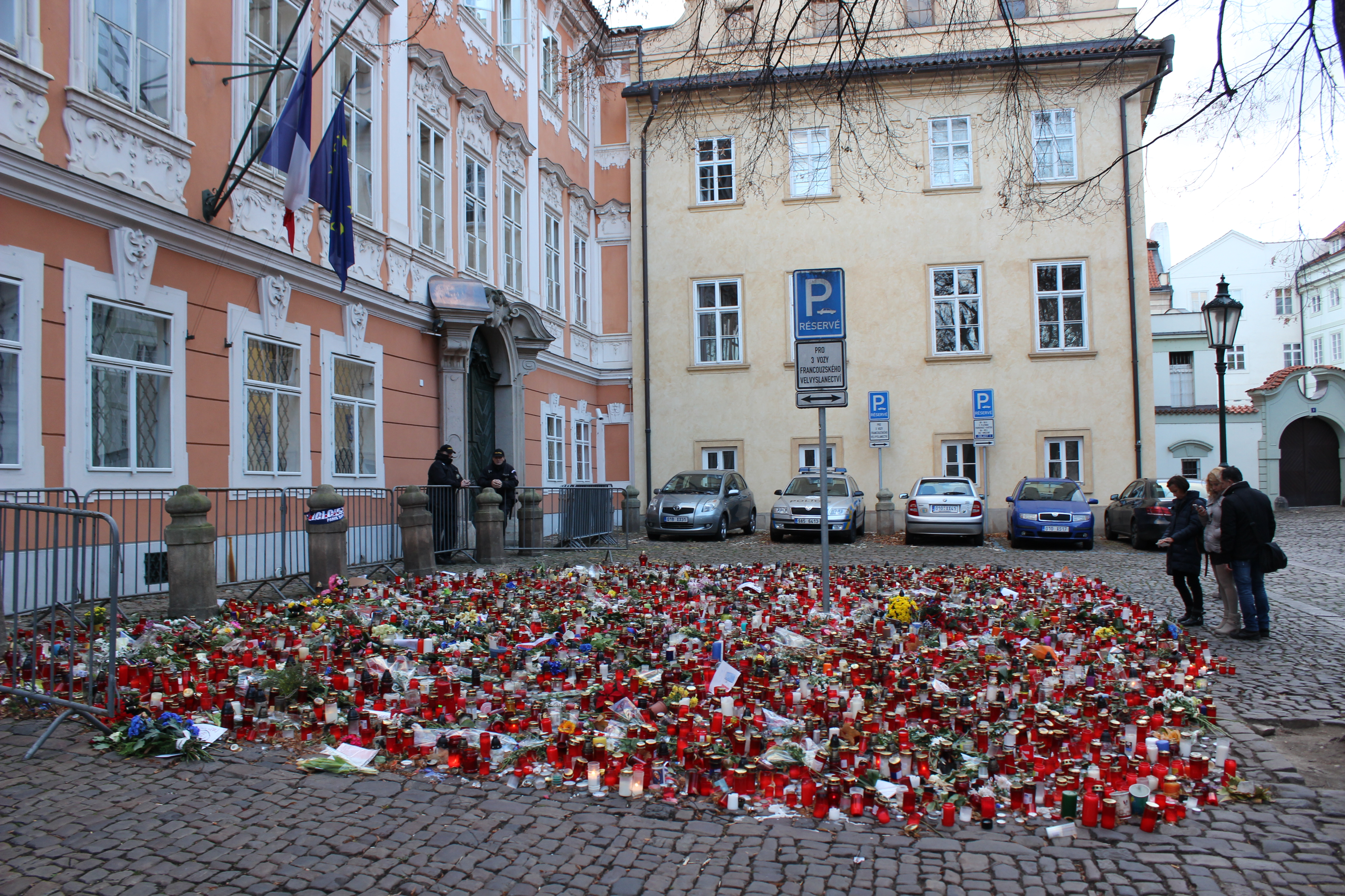 Pieta u pražské francouzské ambasády po teroristických útocích v listopadu 2015.